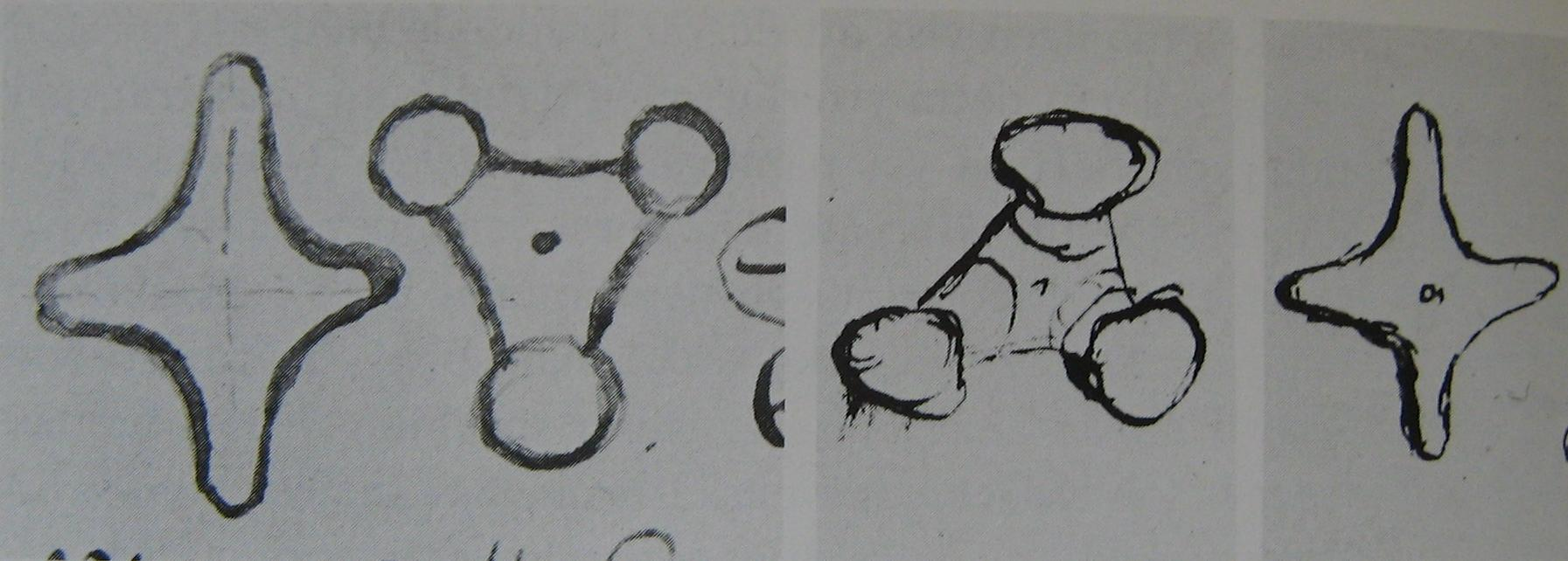 Avbilding av "huede brödt" och "skonroggen" i Malmö stadsbok respektive Helsingörs tingsbok